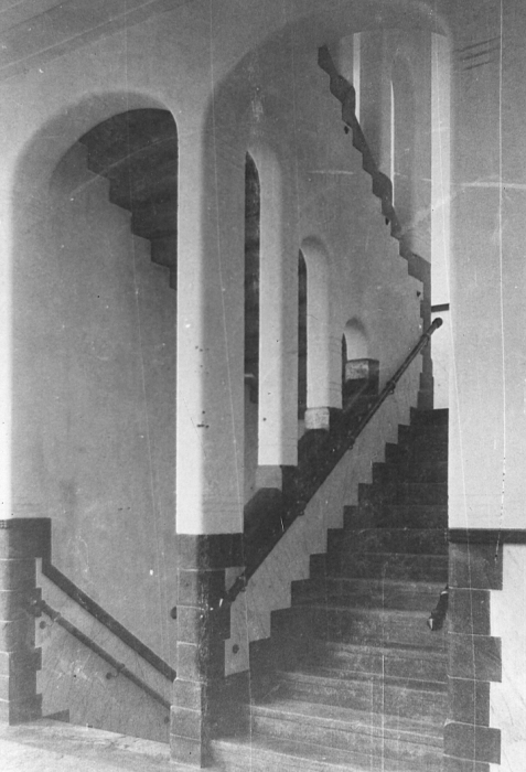 Het interieur van het Gymnasium Apeldoorn. De foto toont het trappenhuis als gezien vanaf de eerste verdieping.